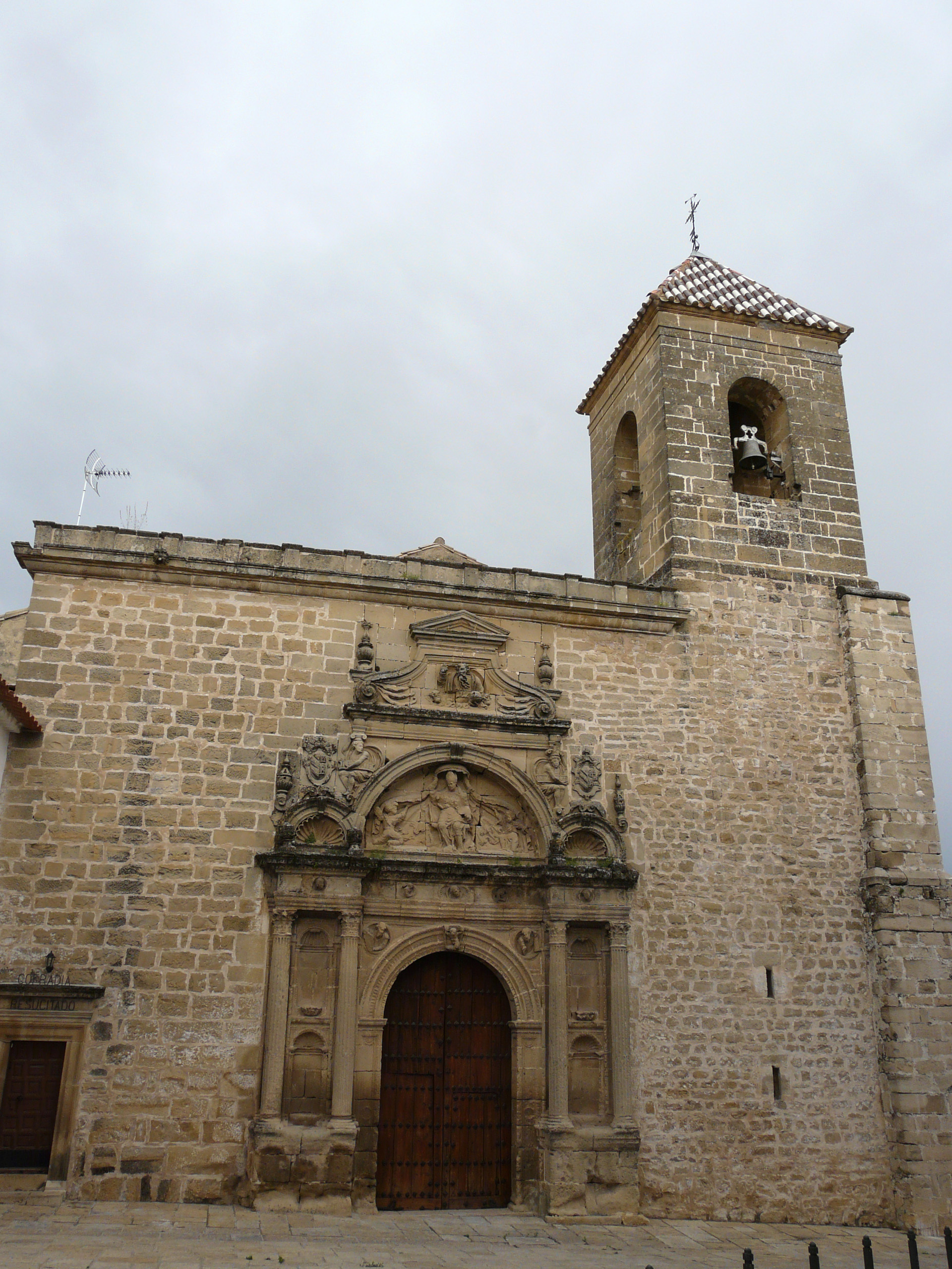 Iglesia de San Nicolás de Bari en Úbeda (Jaén). Portada occidental renacentista y Torre campanario